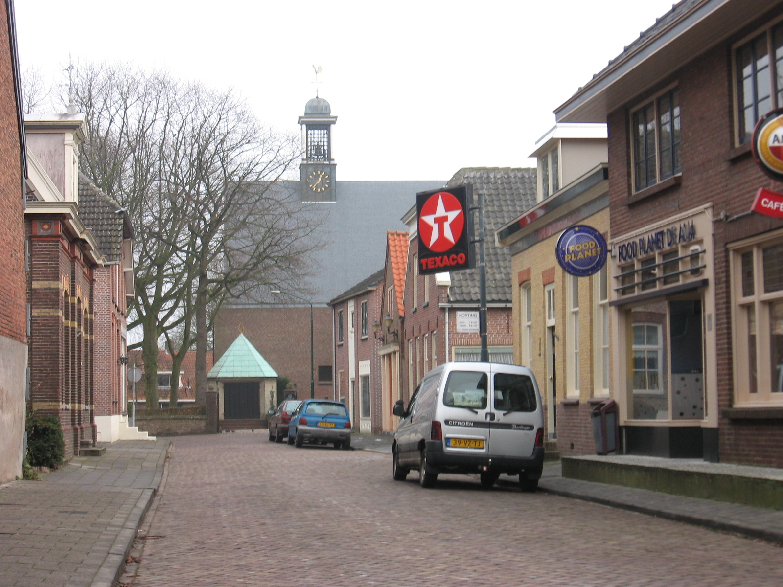 Almkerk